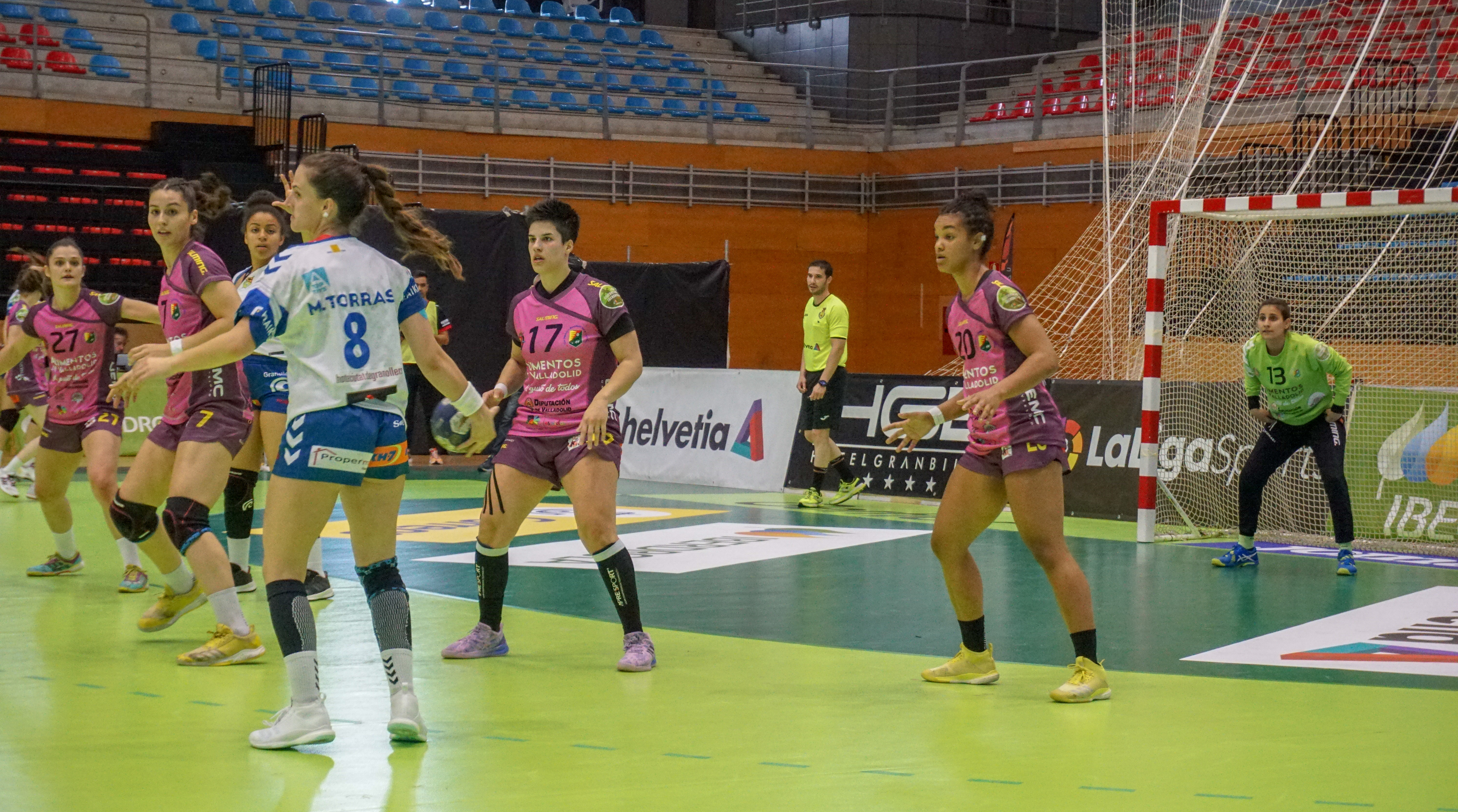 Club Balonmano Granollers vs Aula Alimentos de Valladolid en la Copa de la Reina 2019